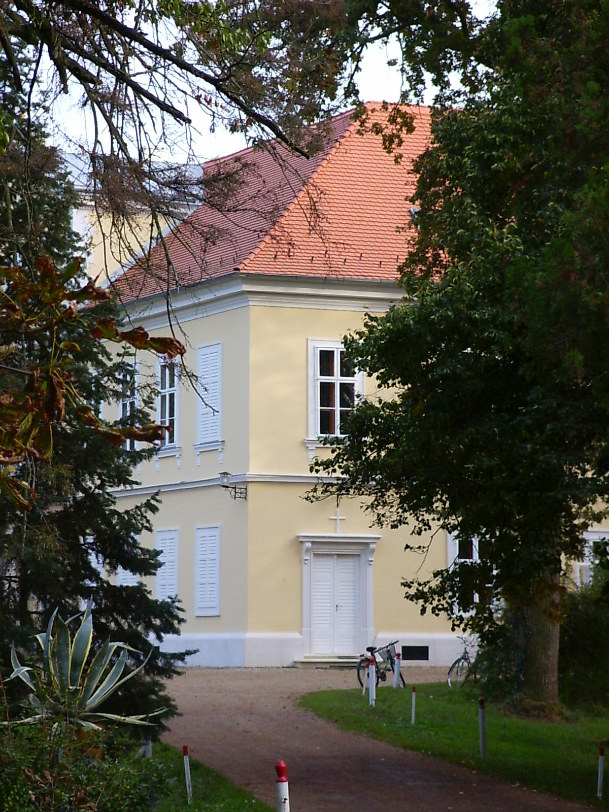 A felújított dénesfai kastély